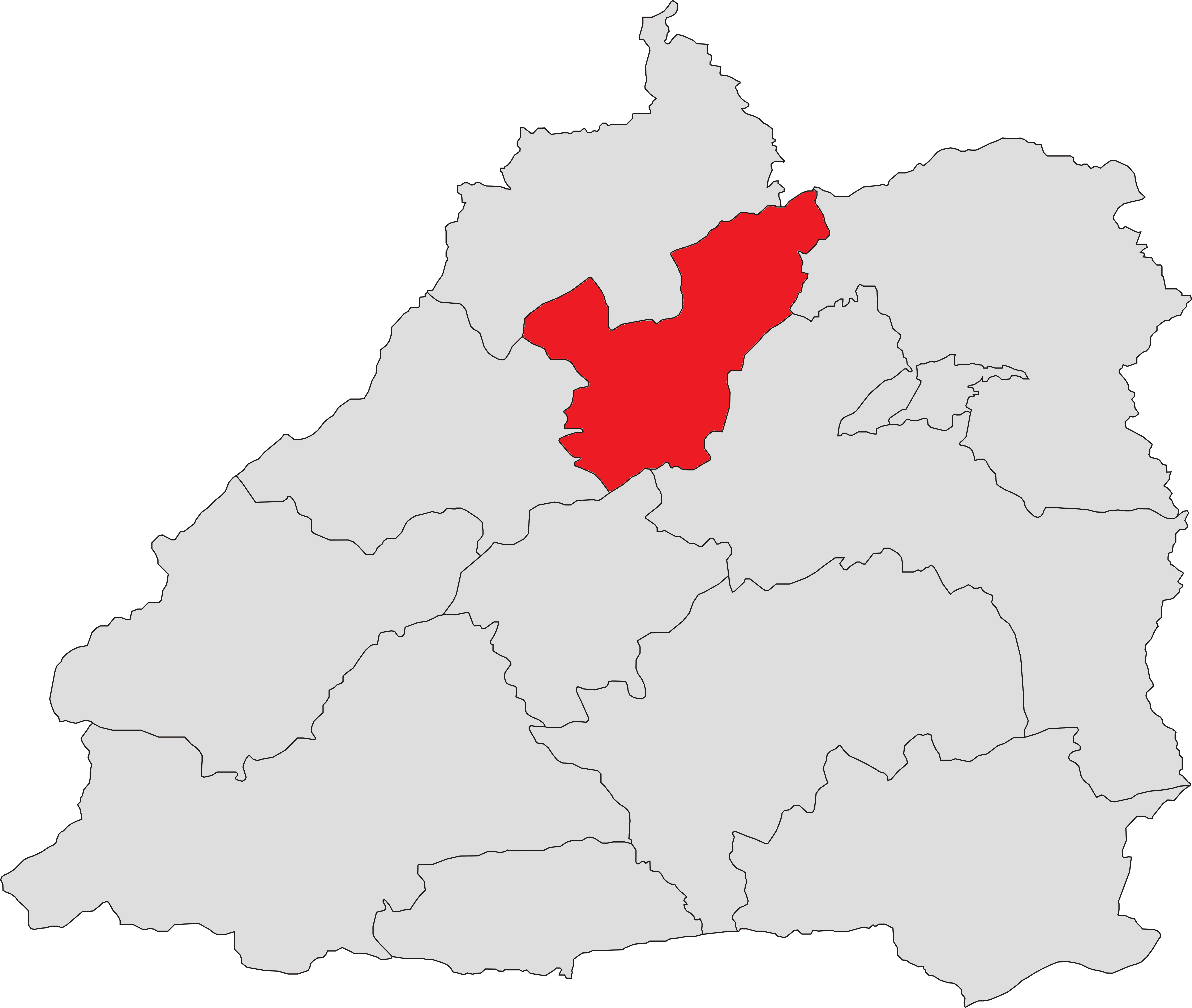 中文（中国大陆）: 芒市轩岗乡位置图